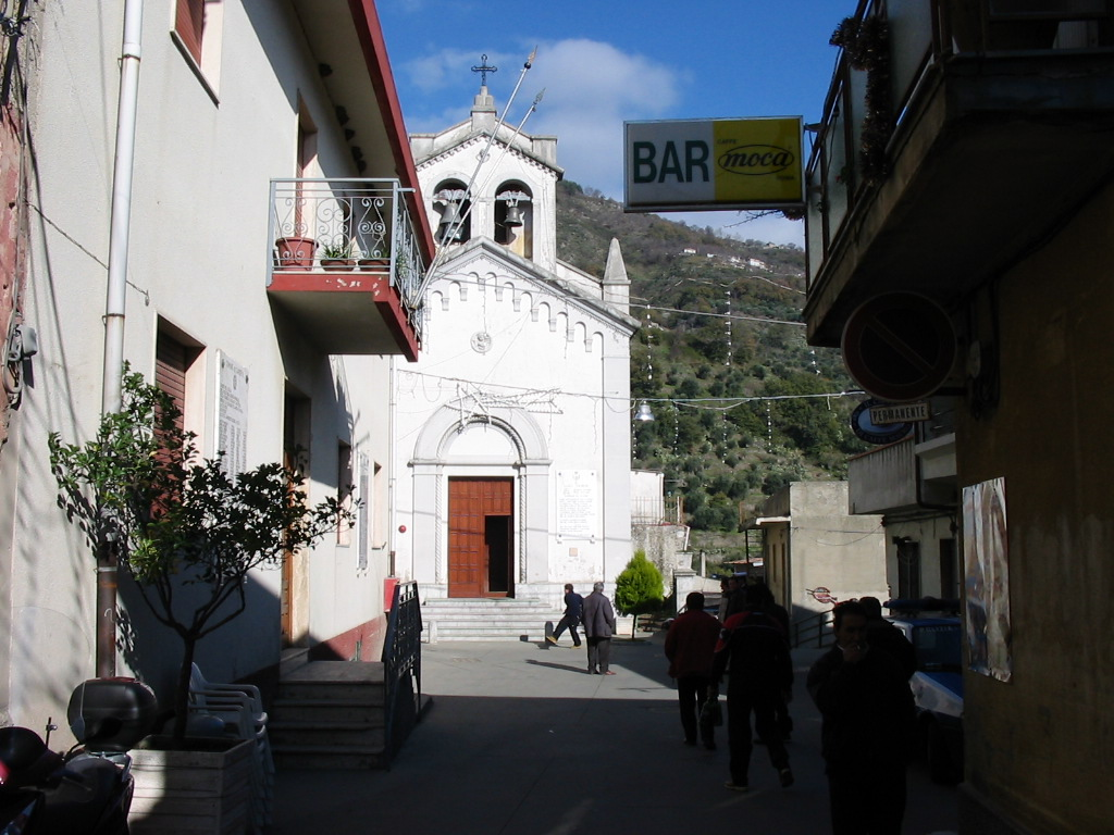 Het centrale plein van Cardeto. Overgenomen van de Italiaanse Wikipedia, waar de afbeelding onder GFDL is geplaatst